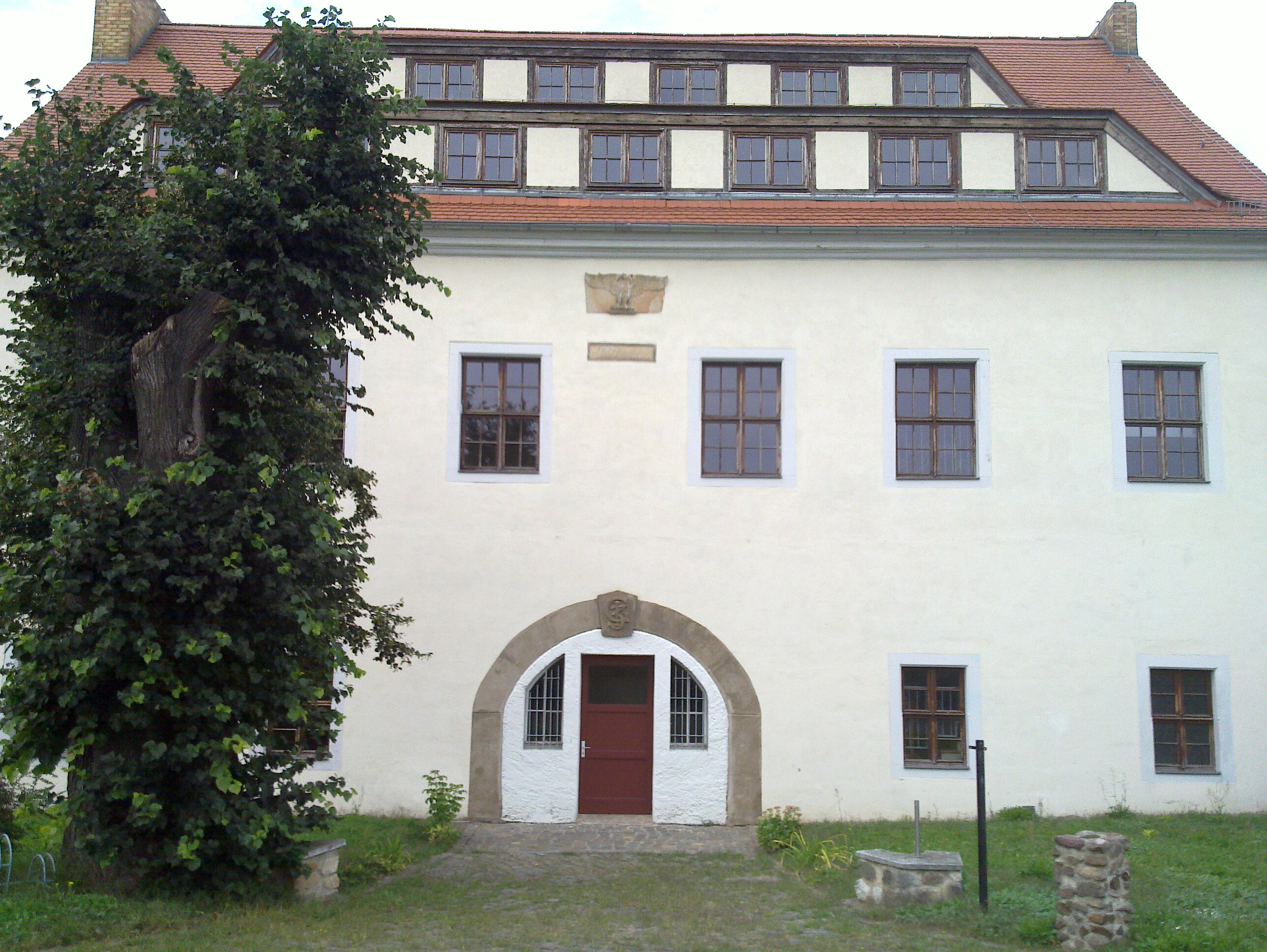 Torbogenhaus in Repitz, ehemaliges Gutshaus Torbogenhaus in Repitz, ehemaliges Gutshaus